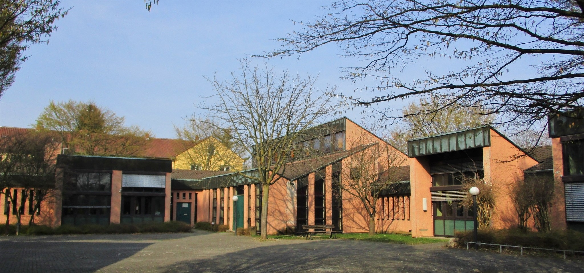 Kath. Kirche St. Raphael, Frankfurt, Ludwig-Landmann-Straße 365, Gemeindehaus